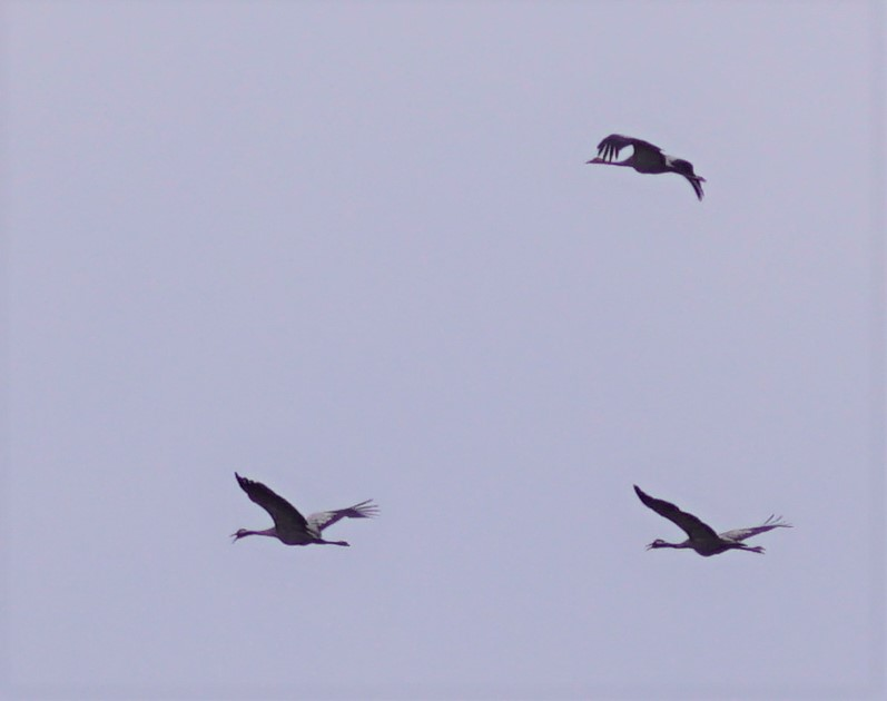 Traner over Naturområdet Kærene på Læsø